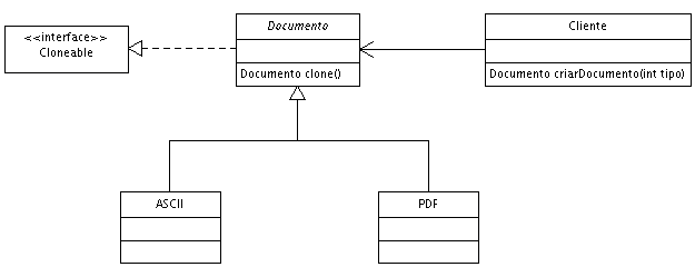 Prototype design pattern UML diagram.